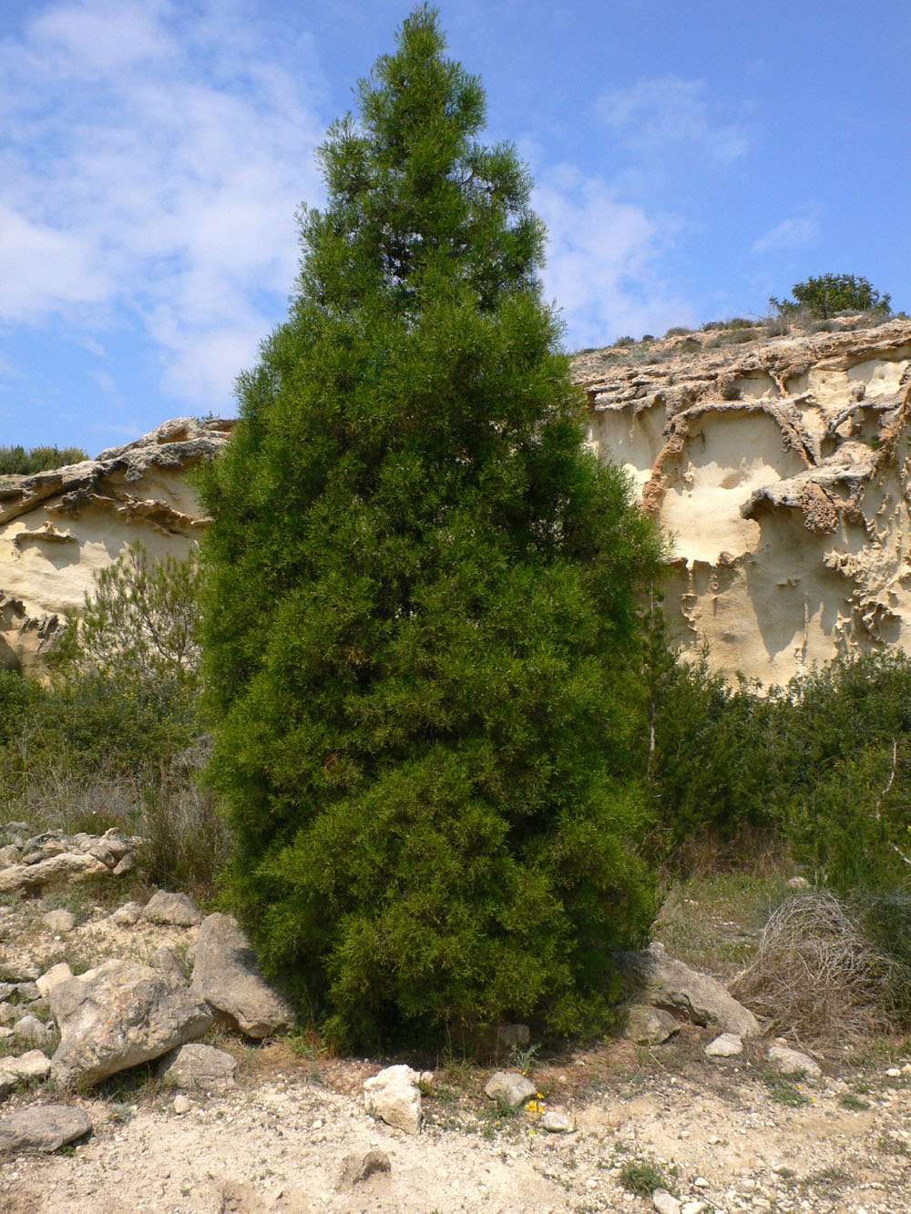 Tetraclinis articulata de repoblación en las Canteras romanas de Cartagena (Spain)